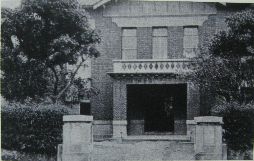 新莊街役場Bân-lâm-gú: Sin-chng-ke ia̍h-tiûⁿ